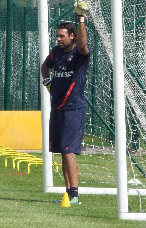 Salvatore Sirigu au Camp des Loges